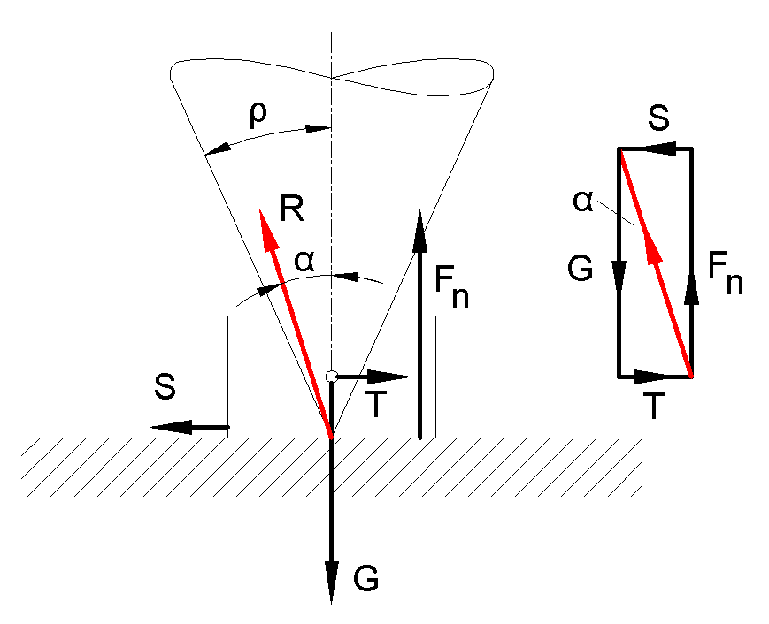 Súrlódás kúpja